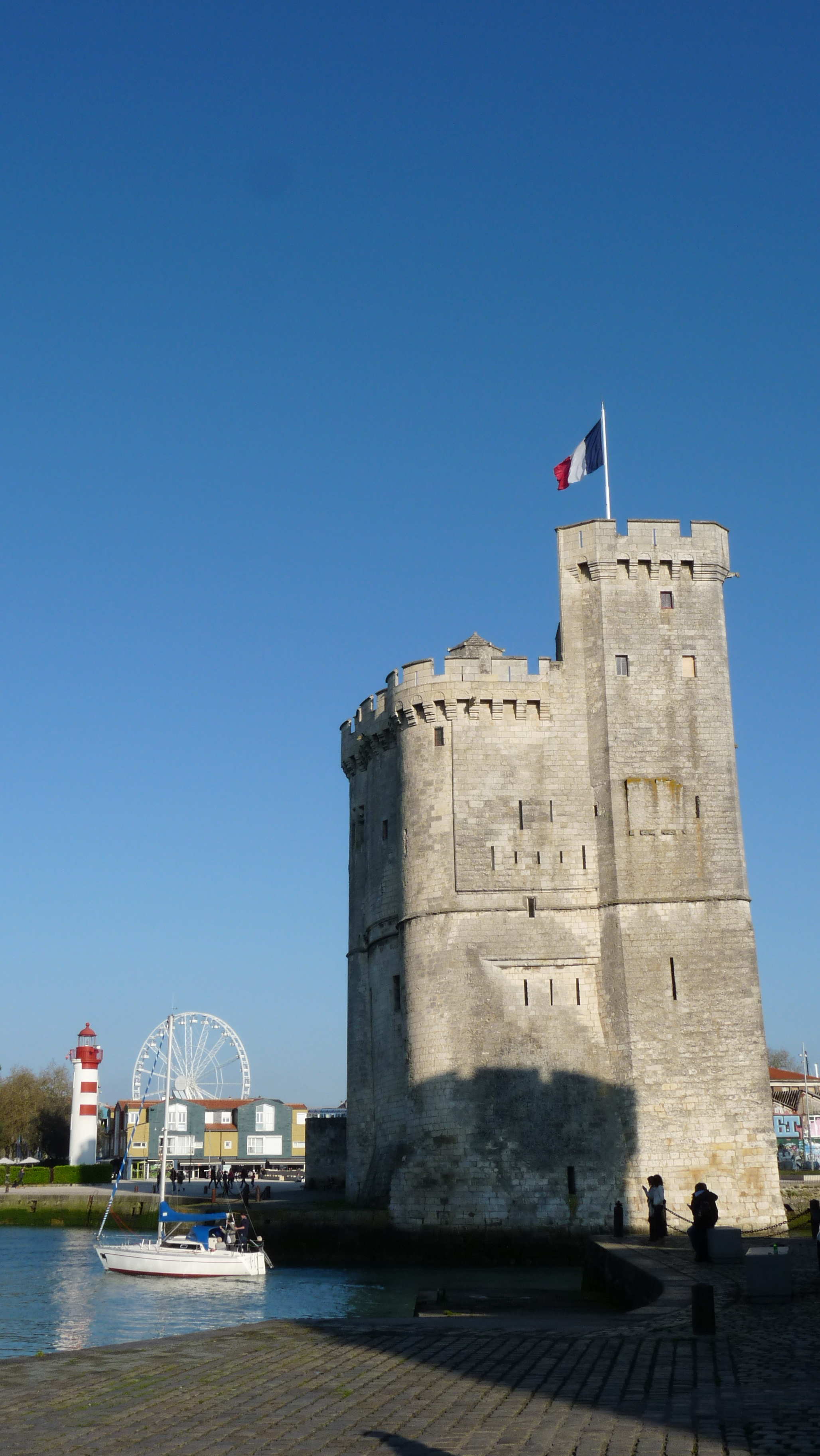 Tour Saint Nicolas (Turo Sankto Nikolao) en La Rochelle